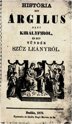 Árgilus királyfi címlapja